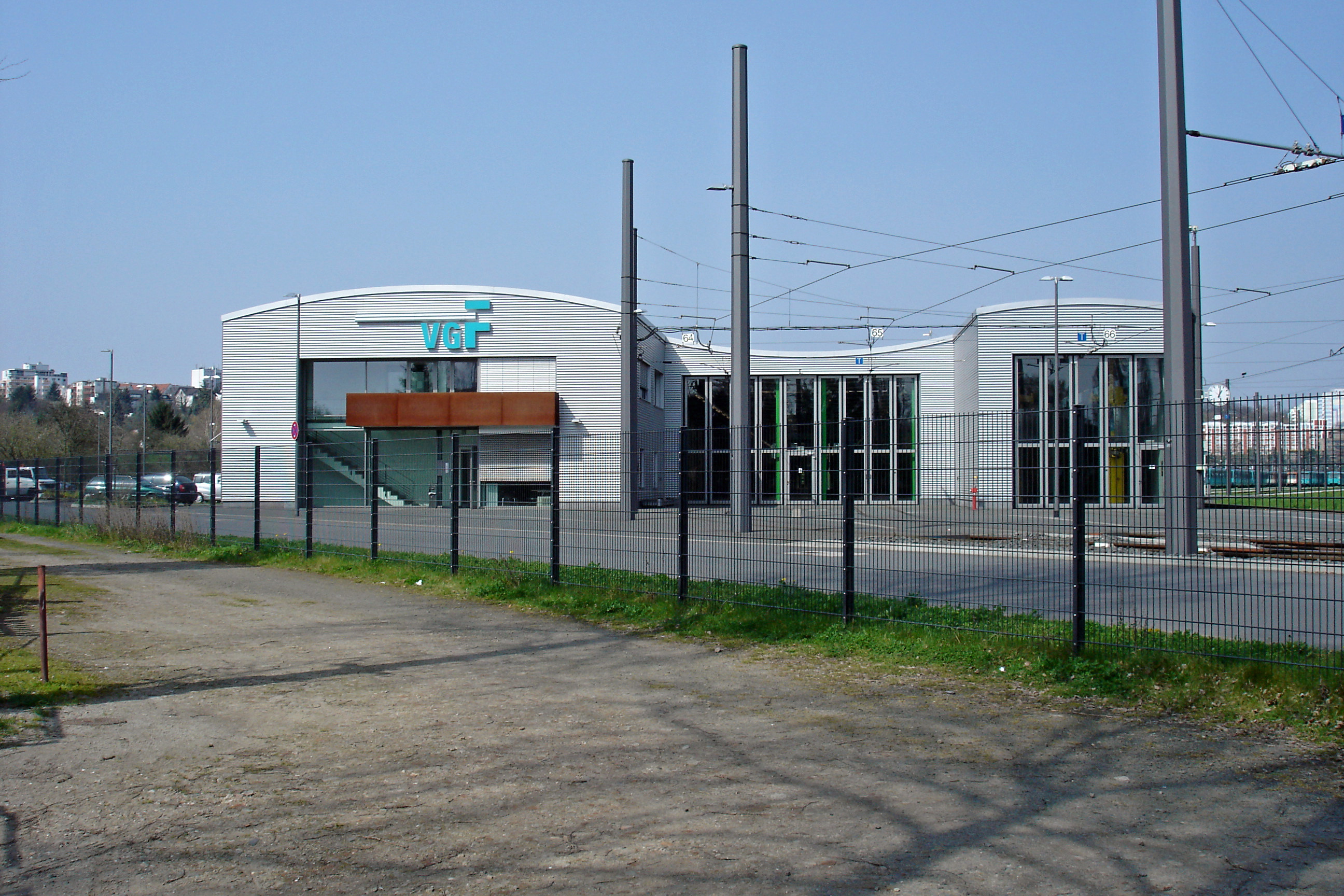 Wartungshallen im Betriebshof Ost (Seckbach)